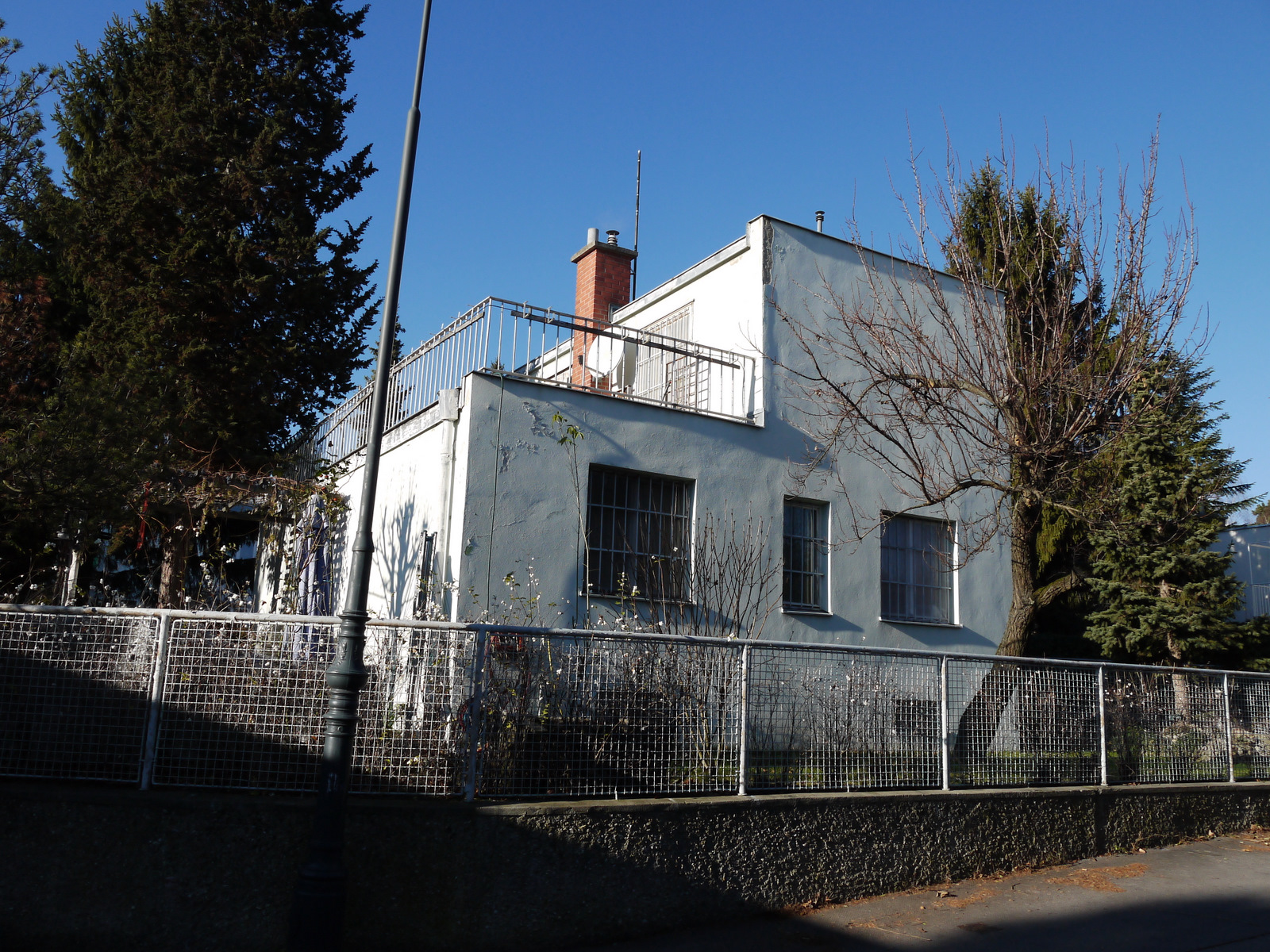 Woinovichgasse 32 Josef Frank Vorderseite